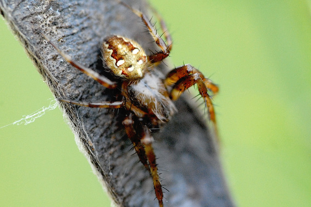 male Araneus quadratus from Commanster, Belgian High Ardennes .